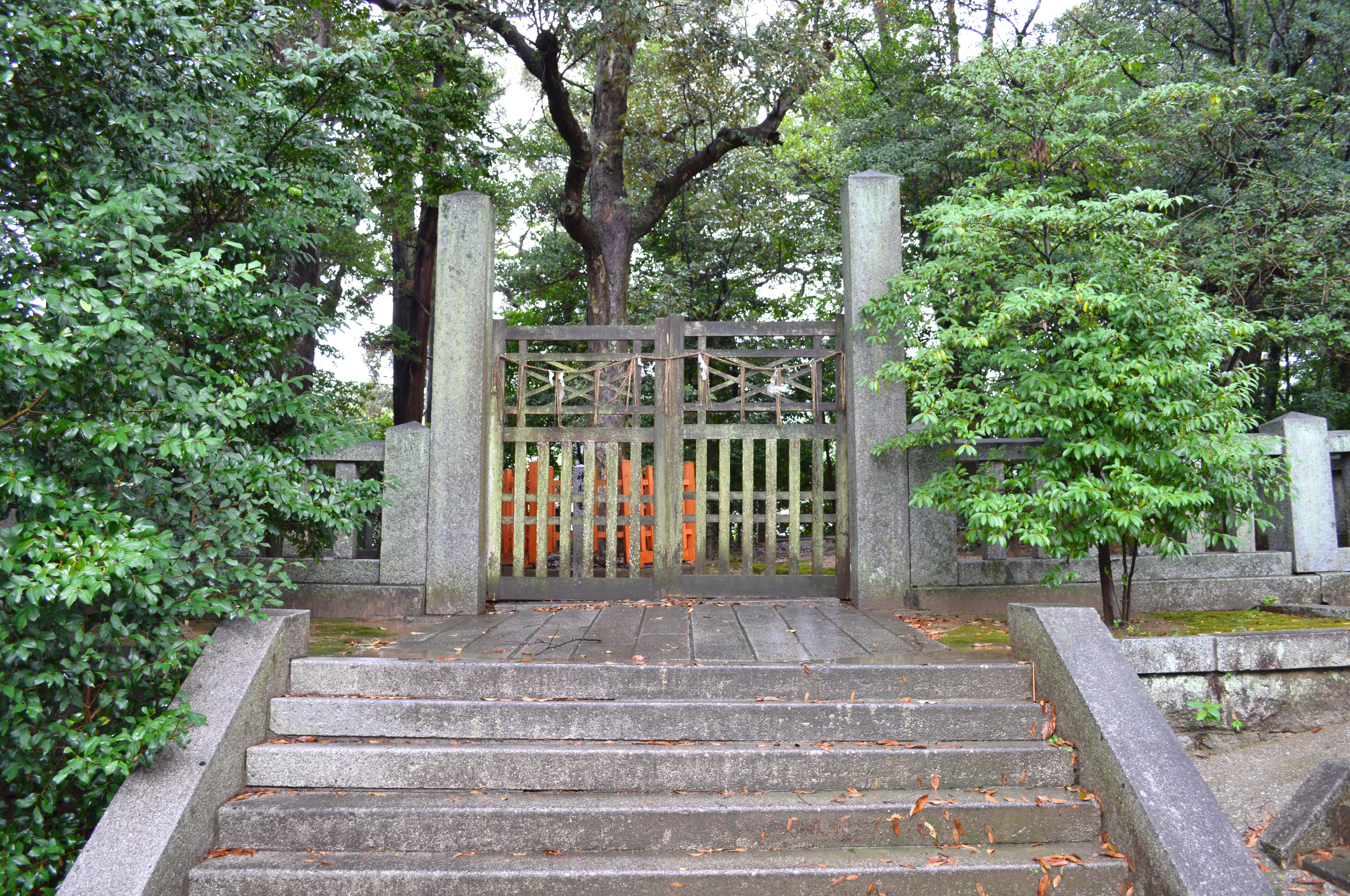 香椎宮 古宮